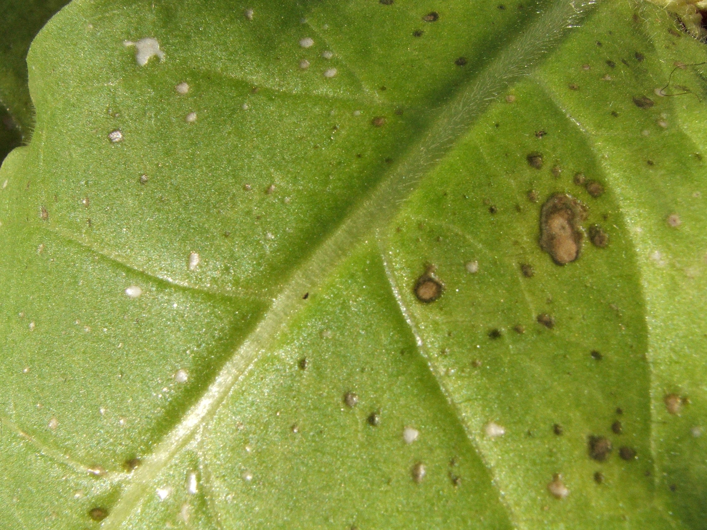 Nécroses foliaires sur le tabac dues à la pollution à l'ozone